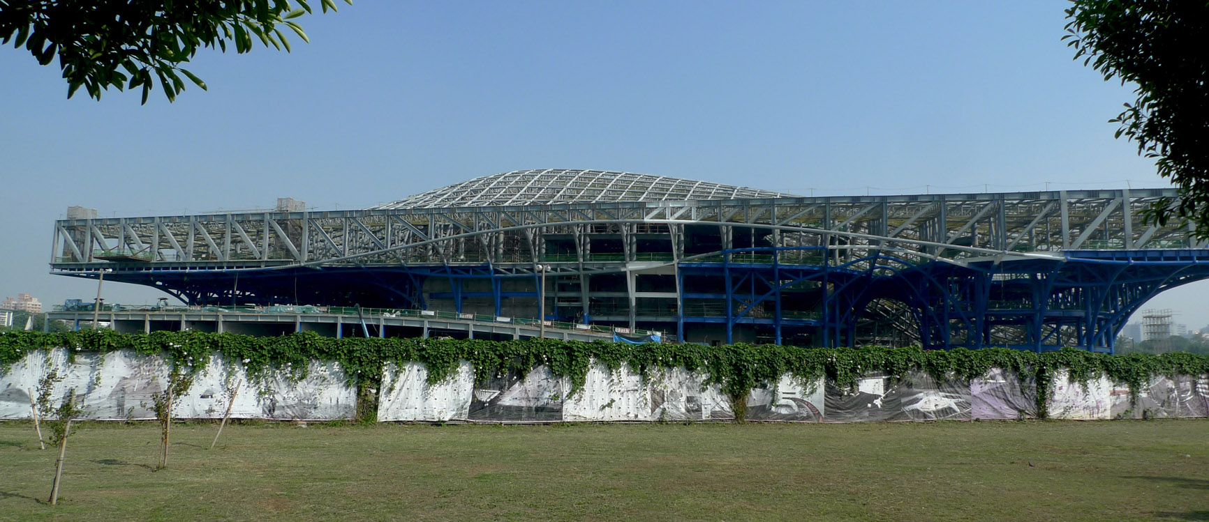 Das im Bau befindliche Wei-Wu-Ying-Zentrum in Kaohsiung